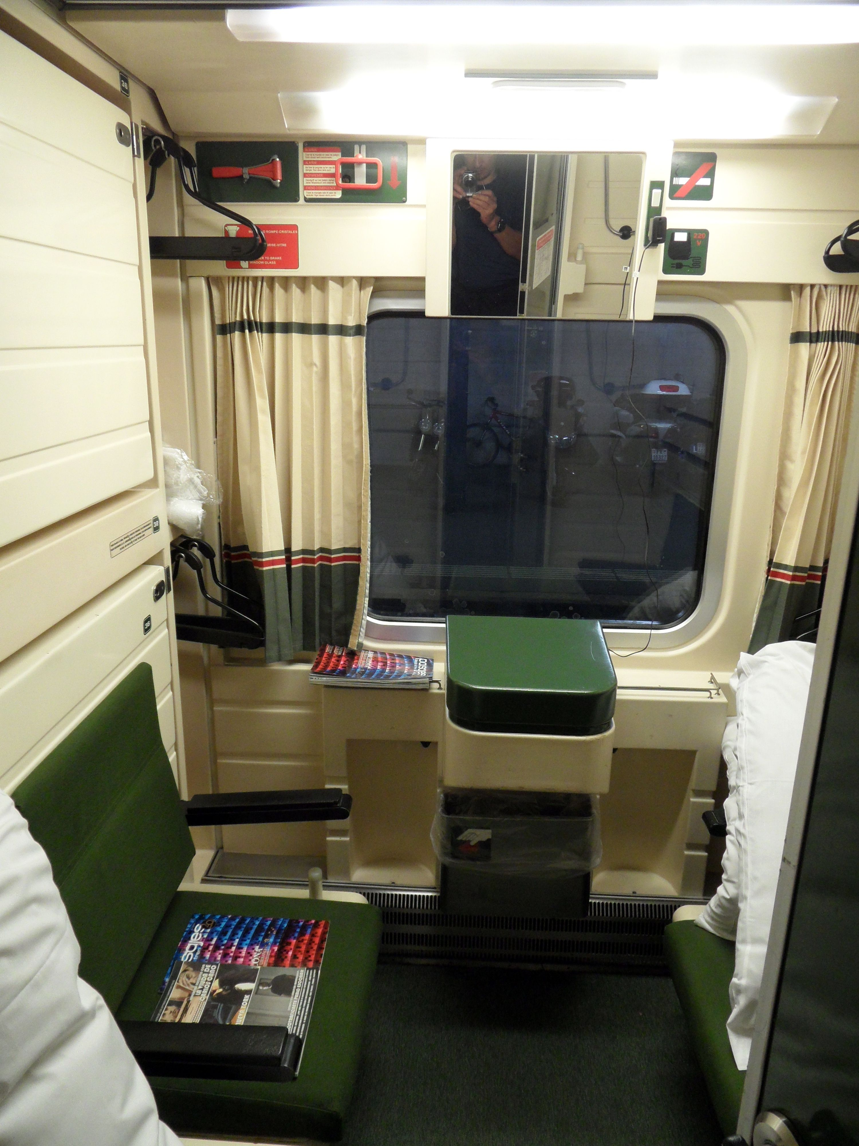 Vierbettabteil, beim Talgo 5 liegen die Betten rechtwinklig zum Wagenkasten. Der Stauraum im Abteil ist sehr begrenzt.